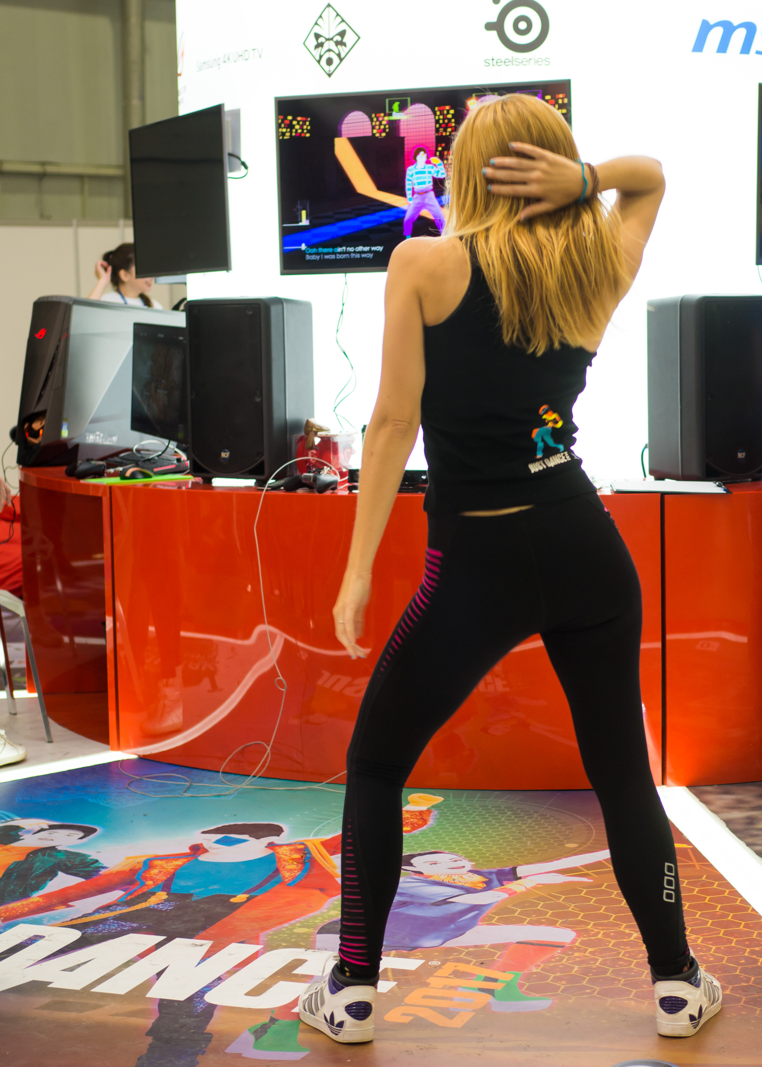 day 4